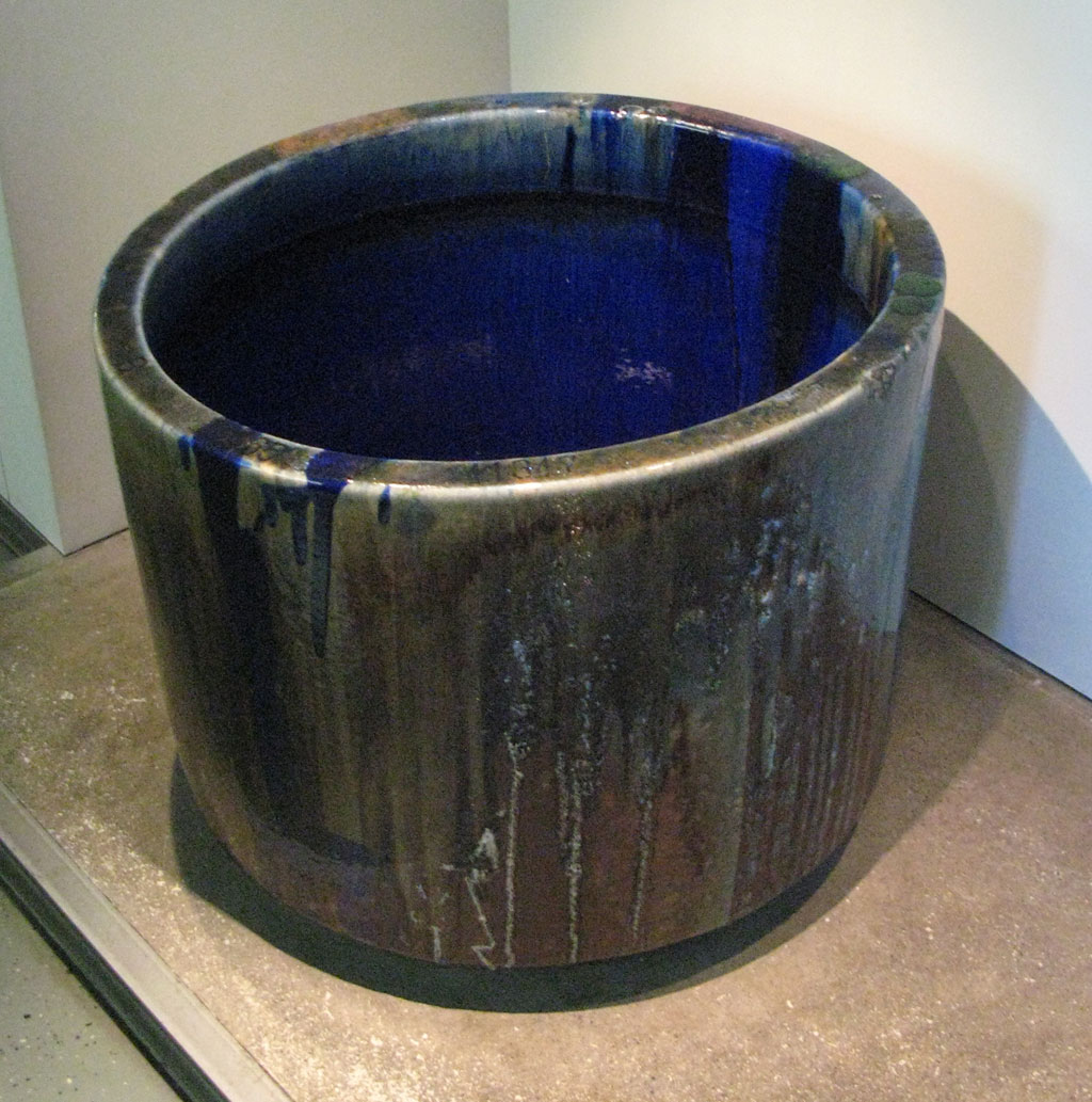 ein Glashafen